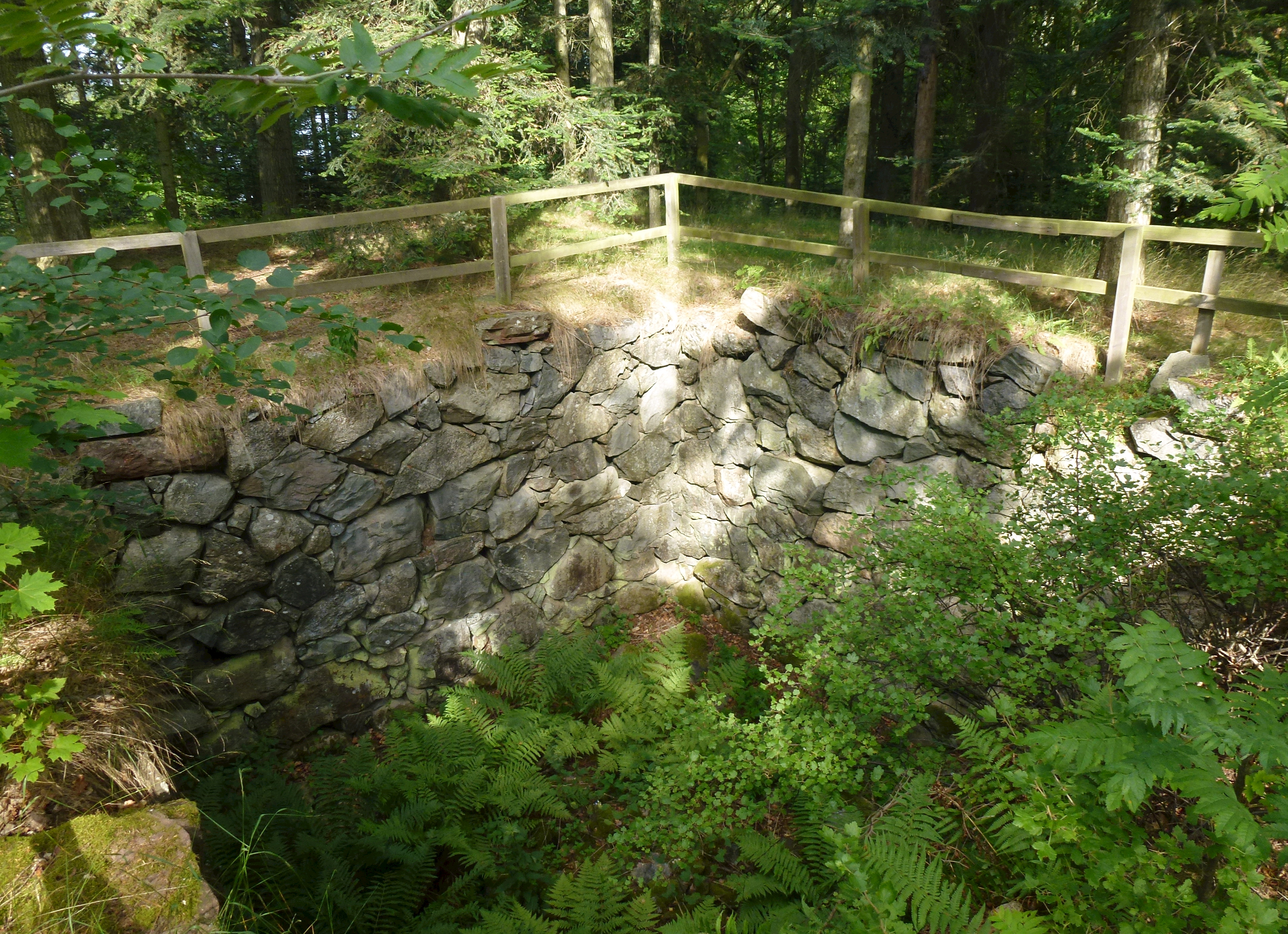 Sentida husgrund vid Hundhamras gravfält